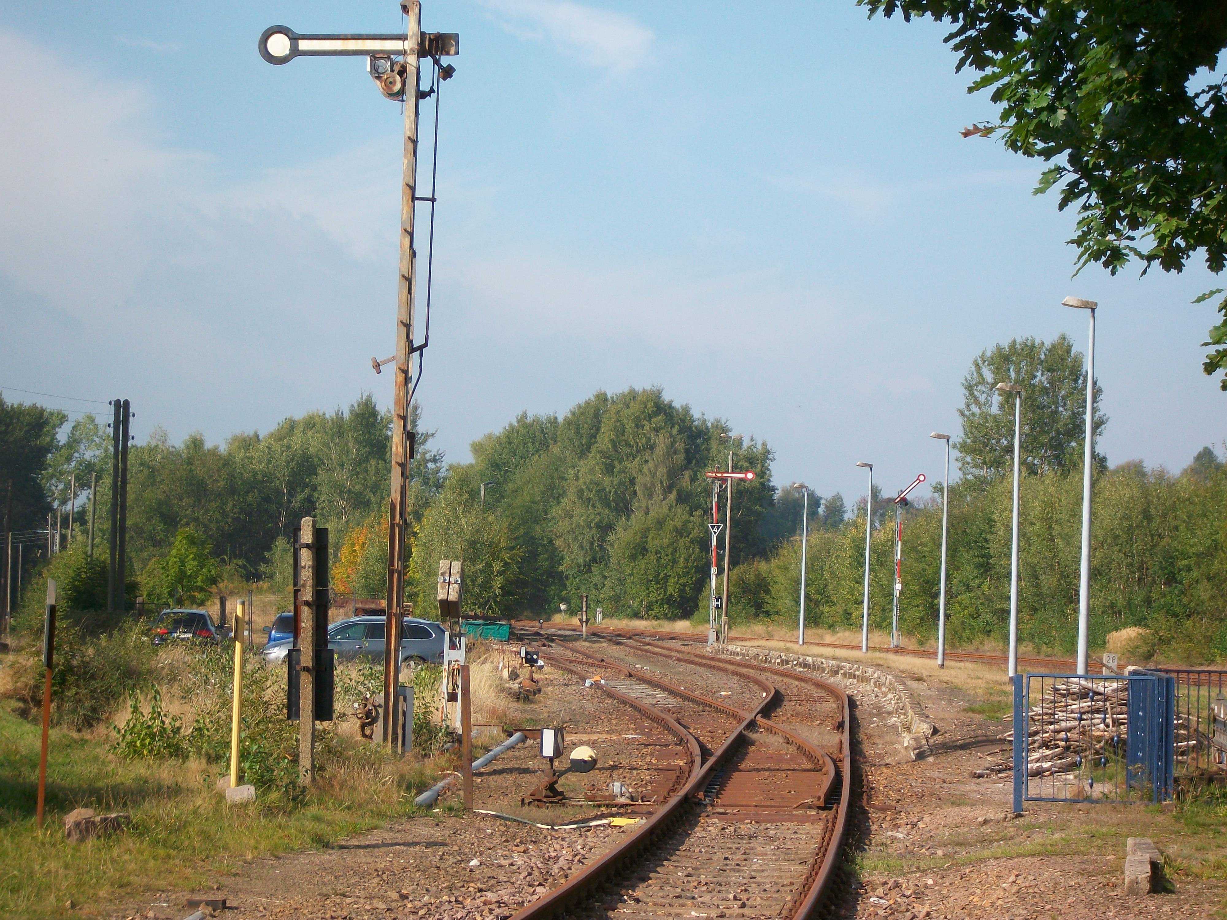 Bf Berthelsdorf (Erzgeb), Gleise nach Brand-Erbisdorf (2016)